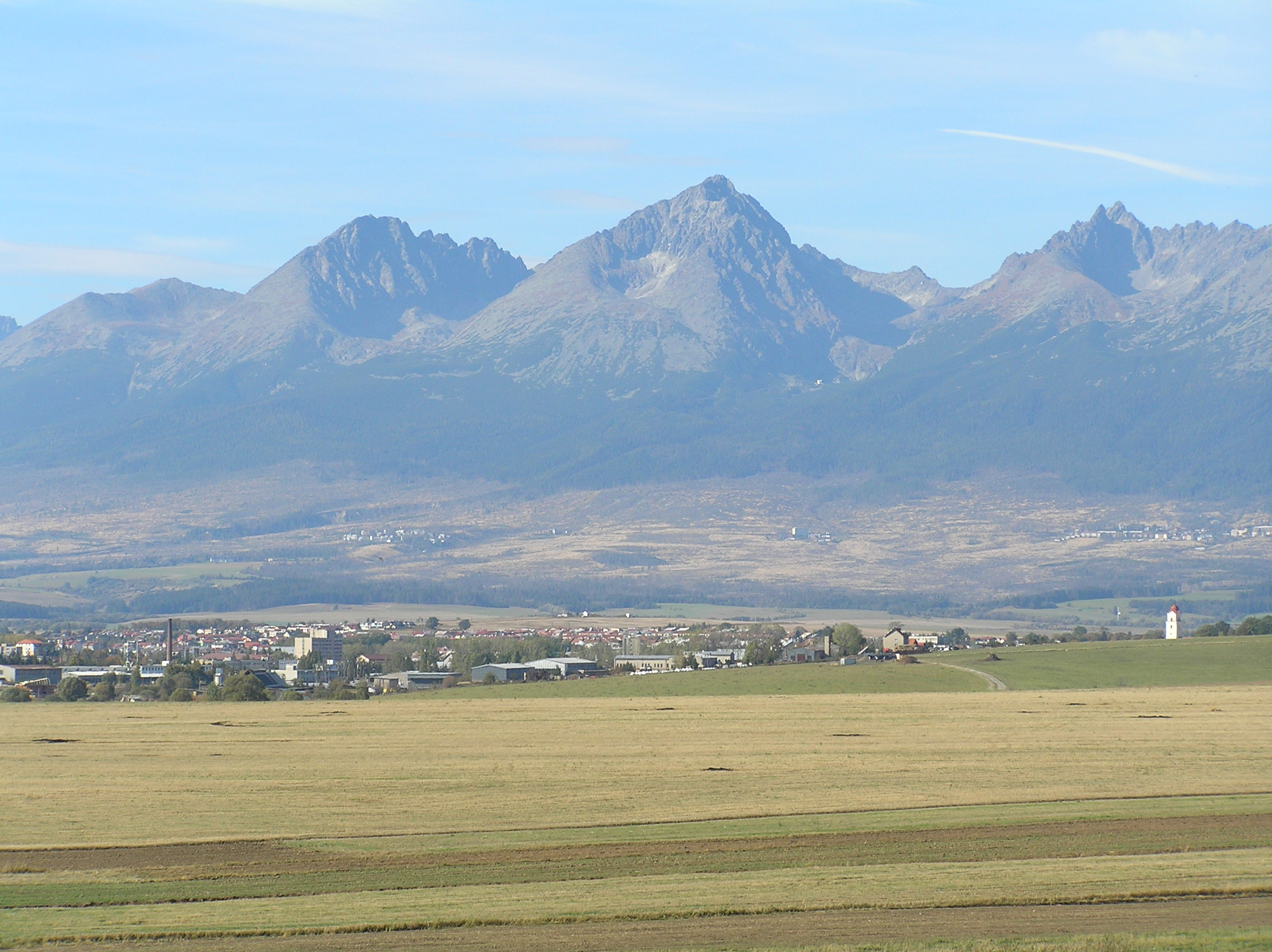 Gerlachovský štít - view from village Hozelec (sjtsk y-326737,x-1201157,h705) to north-west. Slovakia. From left: Klin (2186 m), Tupá (2285 m), Štôlská dolina, Končistá (2538 m), Batizovská dolina, Kotlový štít (2601 m) - Gerlachovský štít (2654 m) - Zadný Gerlachovský štít (2638 m) - Litvorový štít (2413 m), Velická dolina - Guľatý kopec (2121 m) - Velický štít (2318 m), Velické granáty - Bradavica (2476 m), Slavkovská dolina.